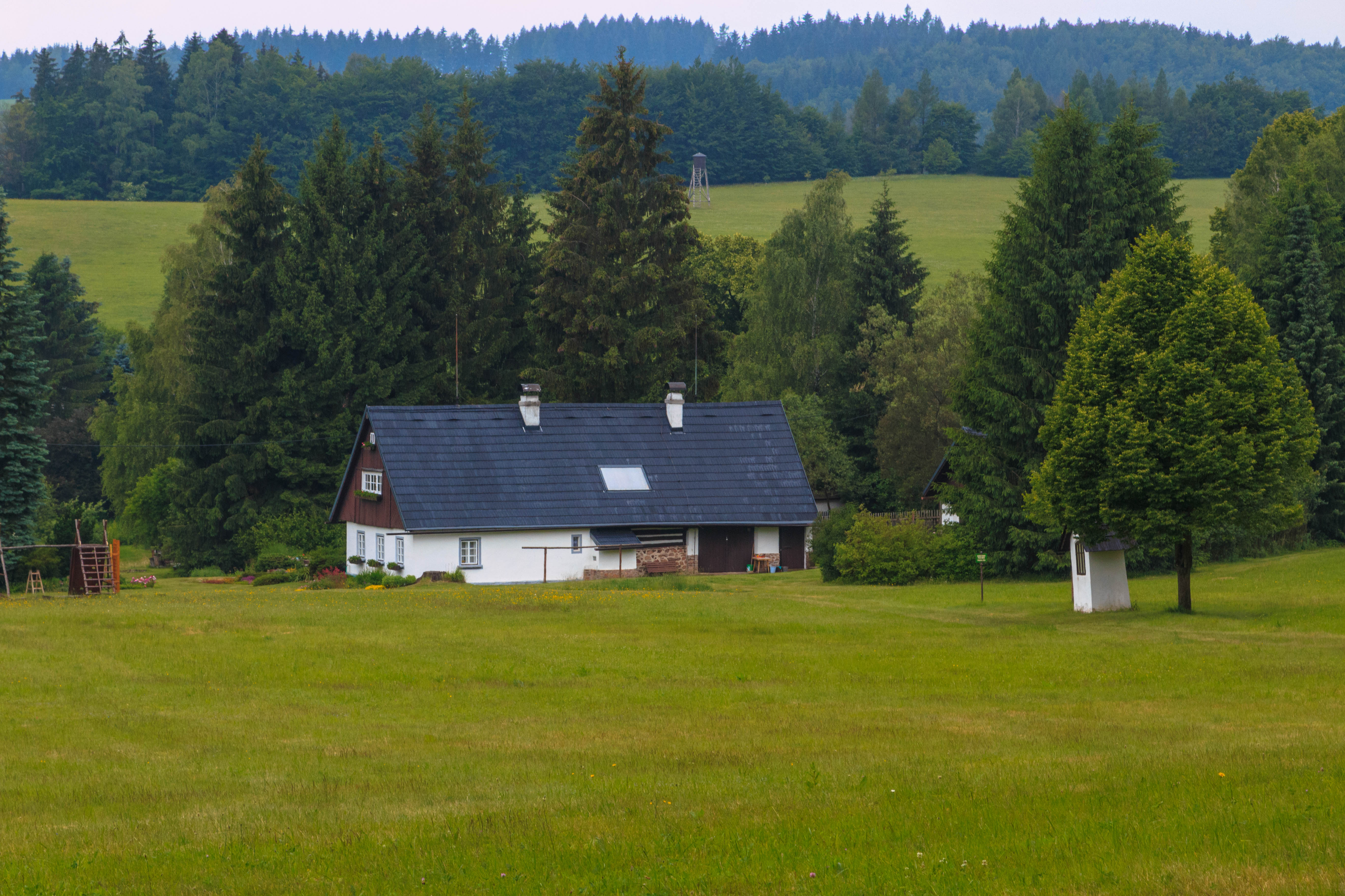 Krahulčí u Nového Hrádku - dům čp. 1